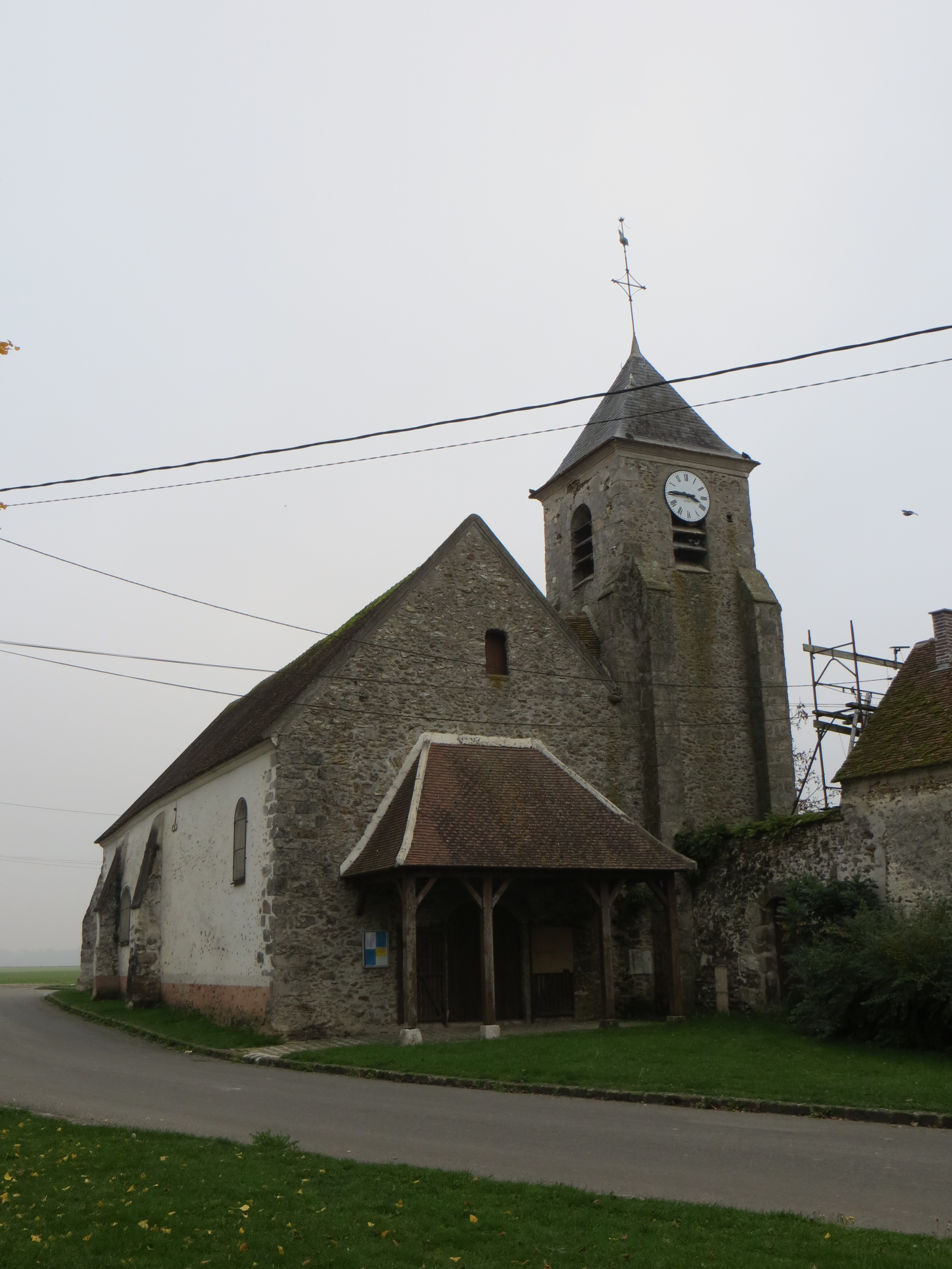 Vue générale de l'église